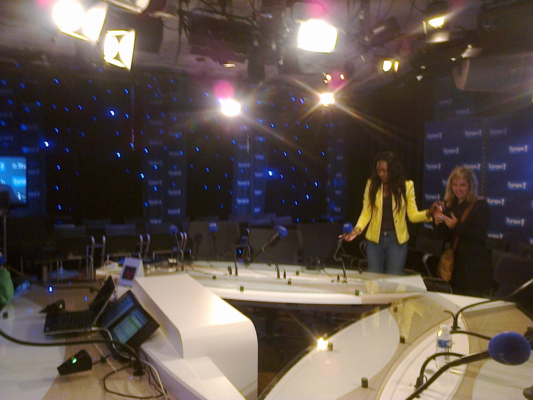 Studio Merlin - Europe 1